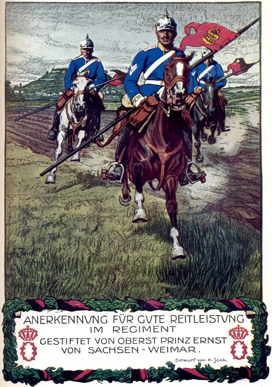 Urkunde des Dragoner-Regiments Königin Olga (1. Württ.) Nr. 25, nach einem Gemälde von A. Jank 1905